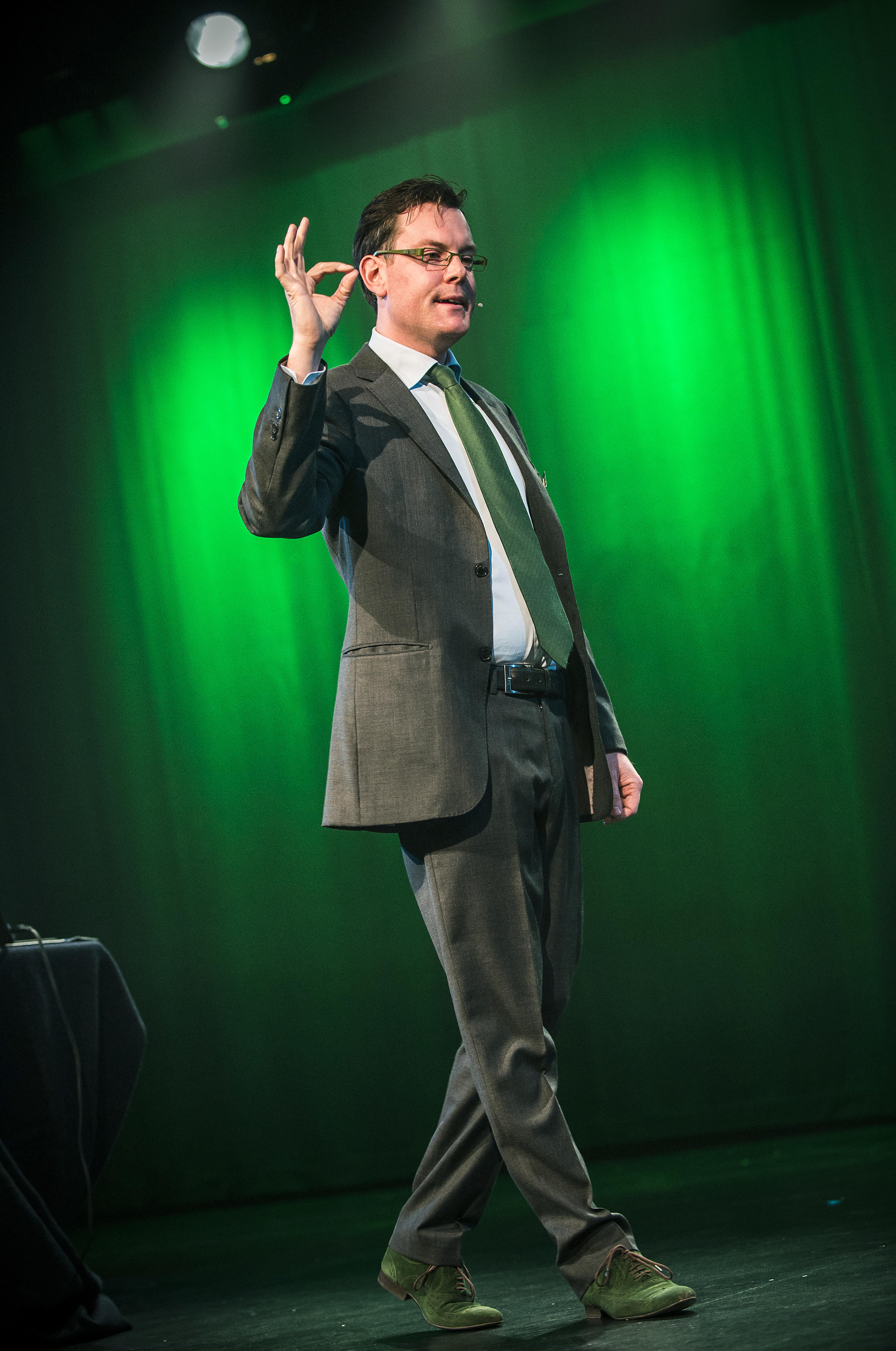 Arnout Van den Bossche uit "De Relatiefluisteraar". Vlaamse komiek en cabaretier.